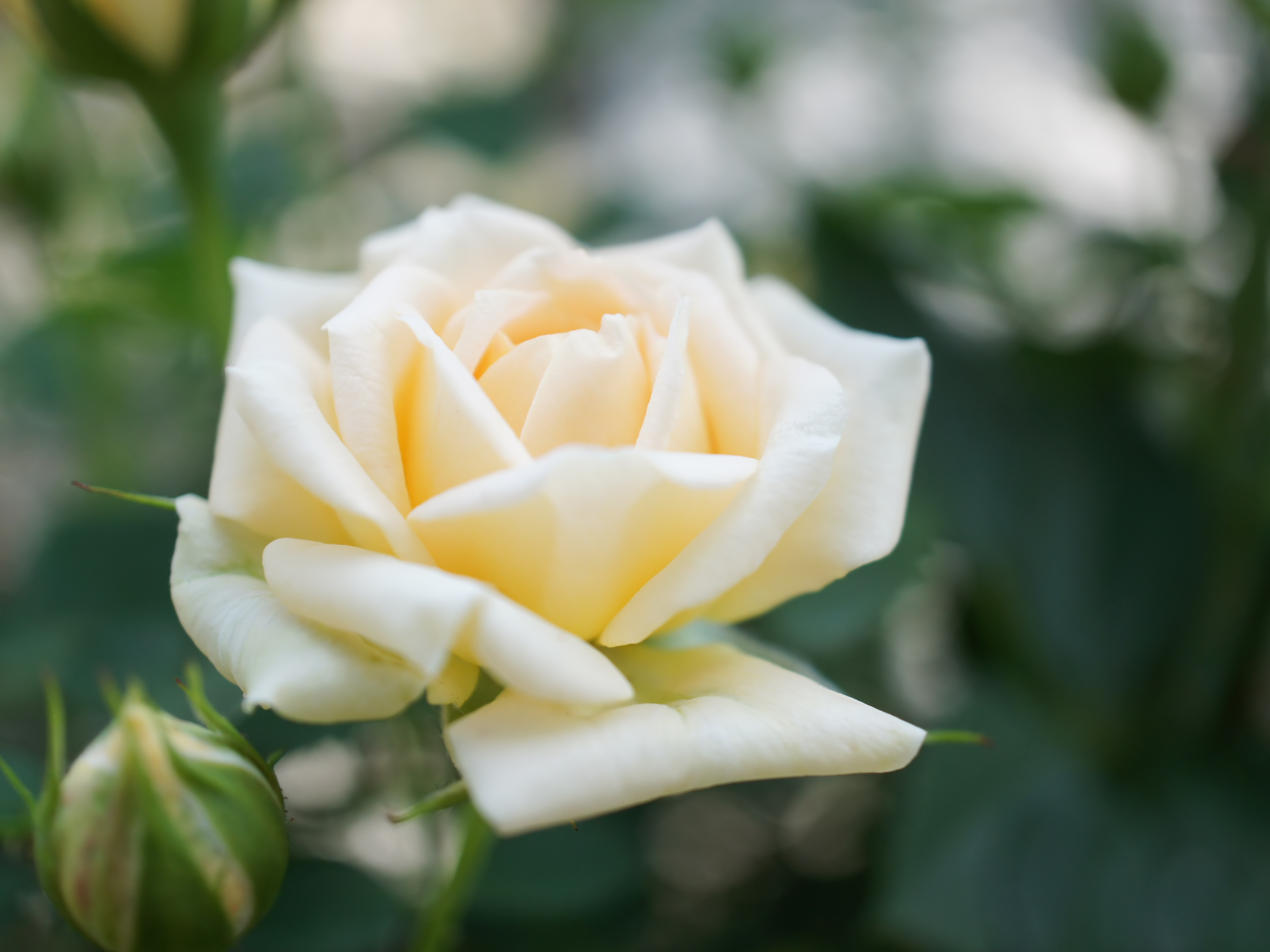 Rose Brilliant Meillandina バラ ブリリアント メイアンディナ Miniature rose ミニチュアローズ France フランス Meilland 1975